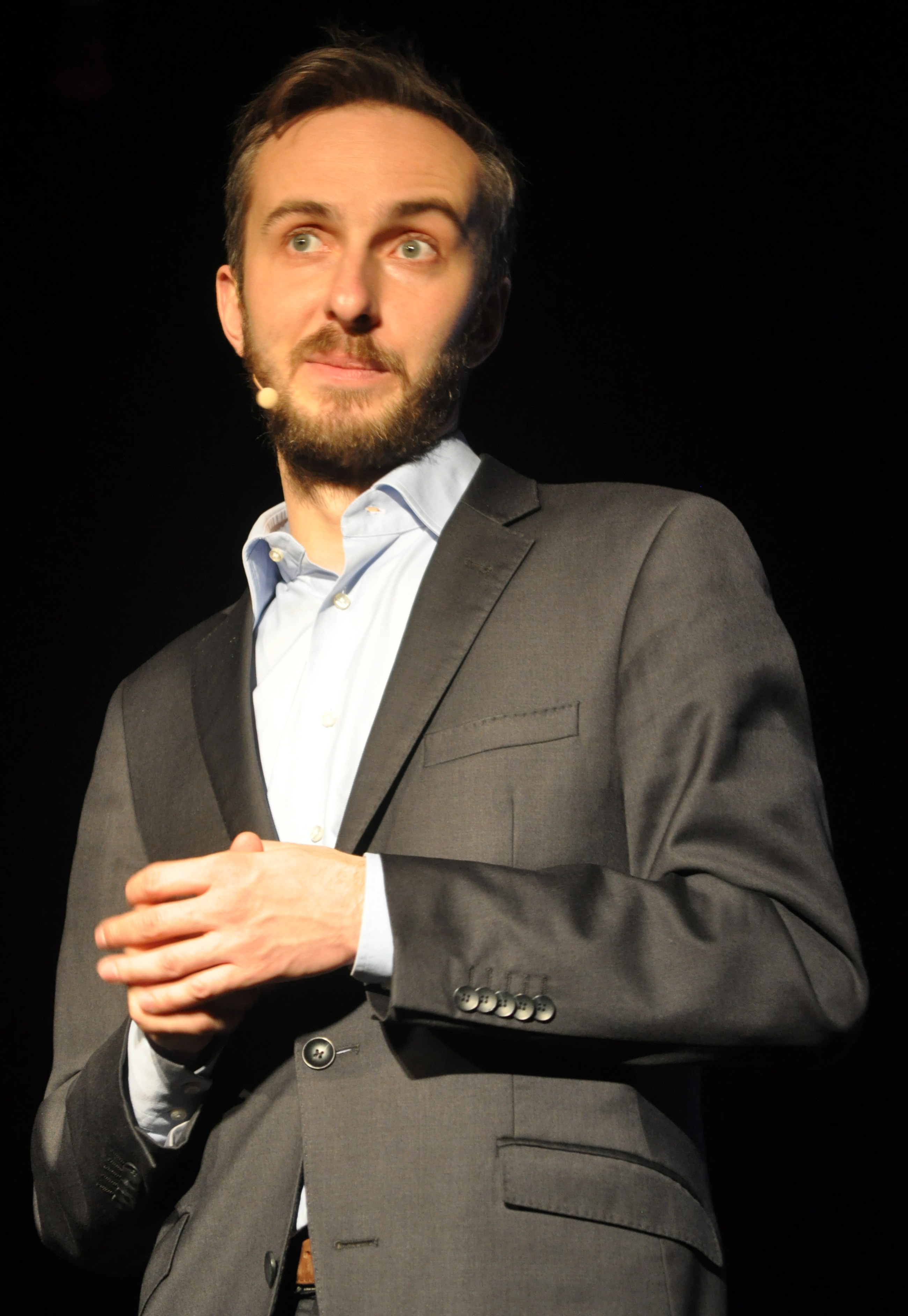 Jan Böhmermann mit seinem Programm "Schlimmer als Jan Böhmermann" in Rostock 2014